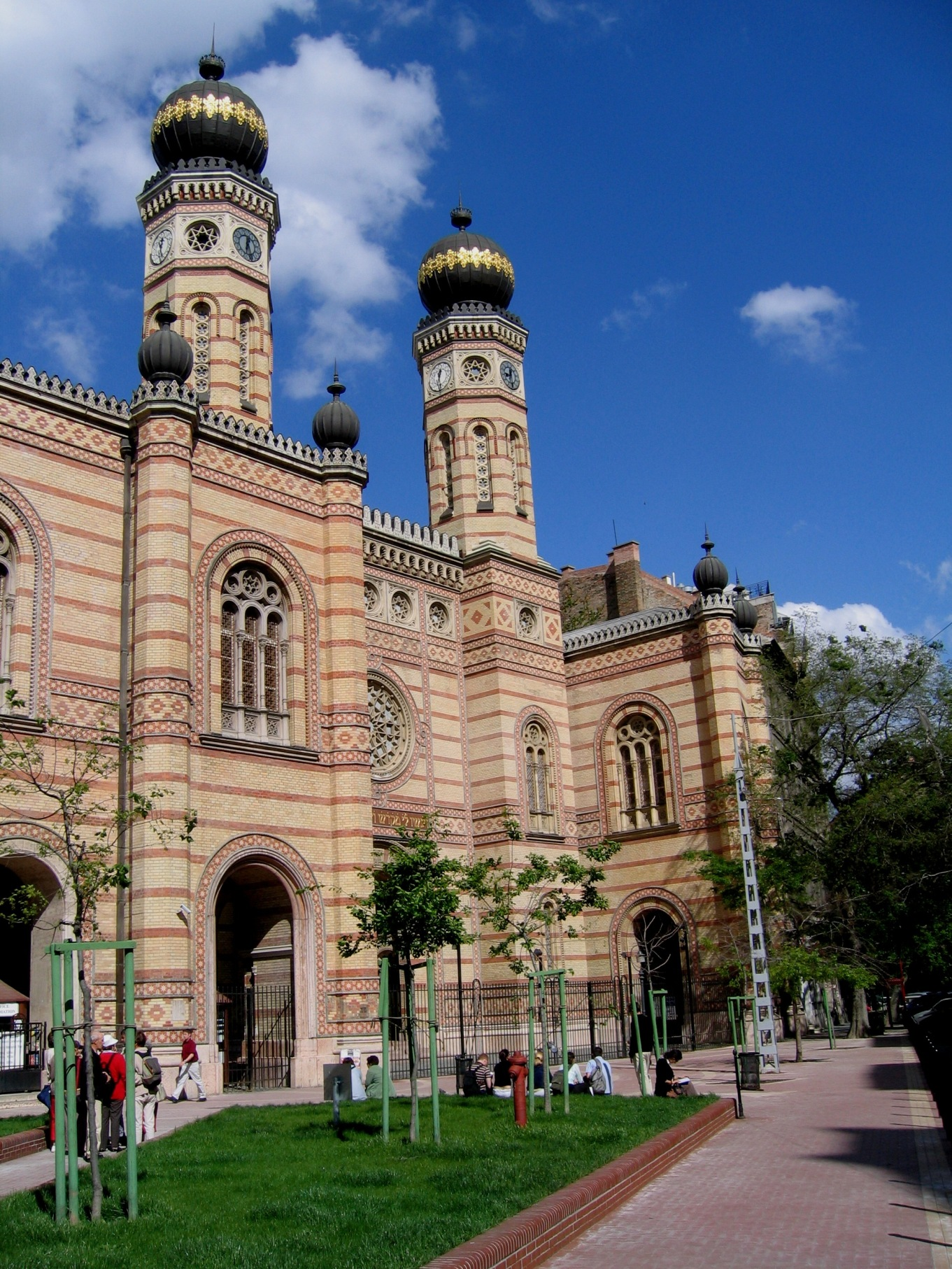 Budapest Grande Synagogue 06052005